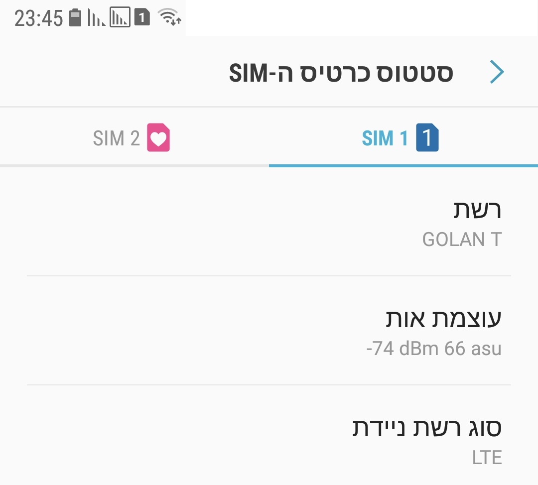 תצוגה של עוצמות אות נקלטות בפס העליות קווים מייצגים עוצמת קליטה של שתי רשתות סלולריות, ובנוסף קשתות המייצגות עוצמת קליטה ב-WiFi עוצמת RSSI -74dbm 66asu LTE גולן טלקום